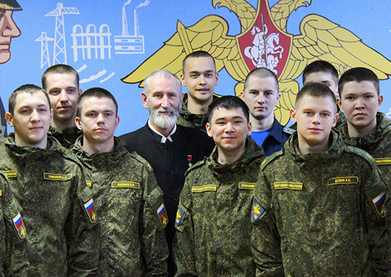 Герой Советского Союза Валерий Бурков в гостях у курсантов Челябинского филиала ВУНЦ ВВС